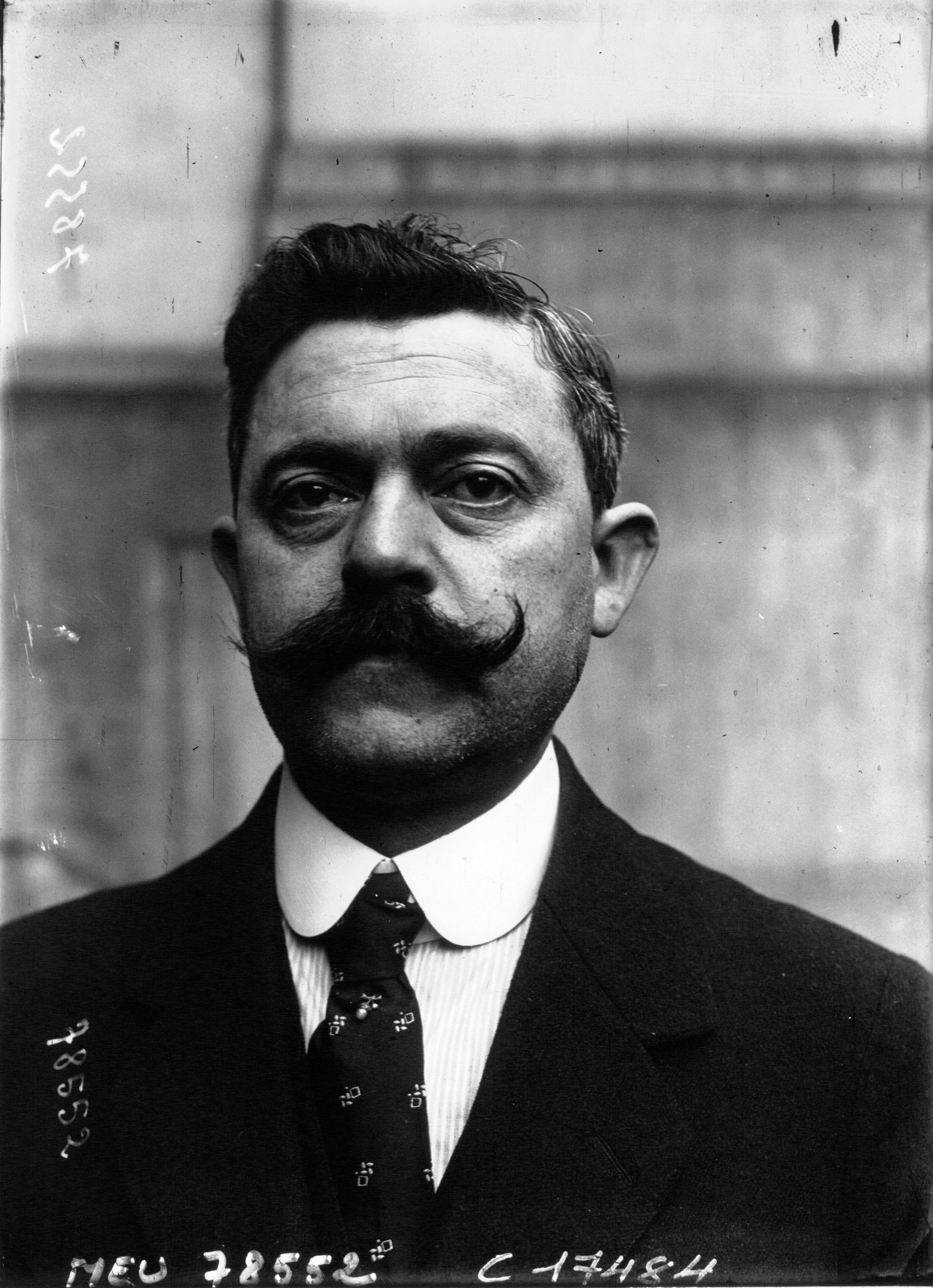 M. Collignon délégué belge au congrès de l'U.C.I.